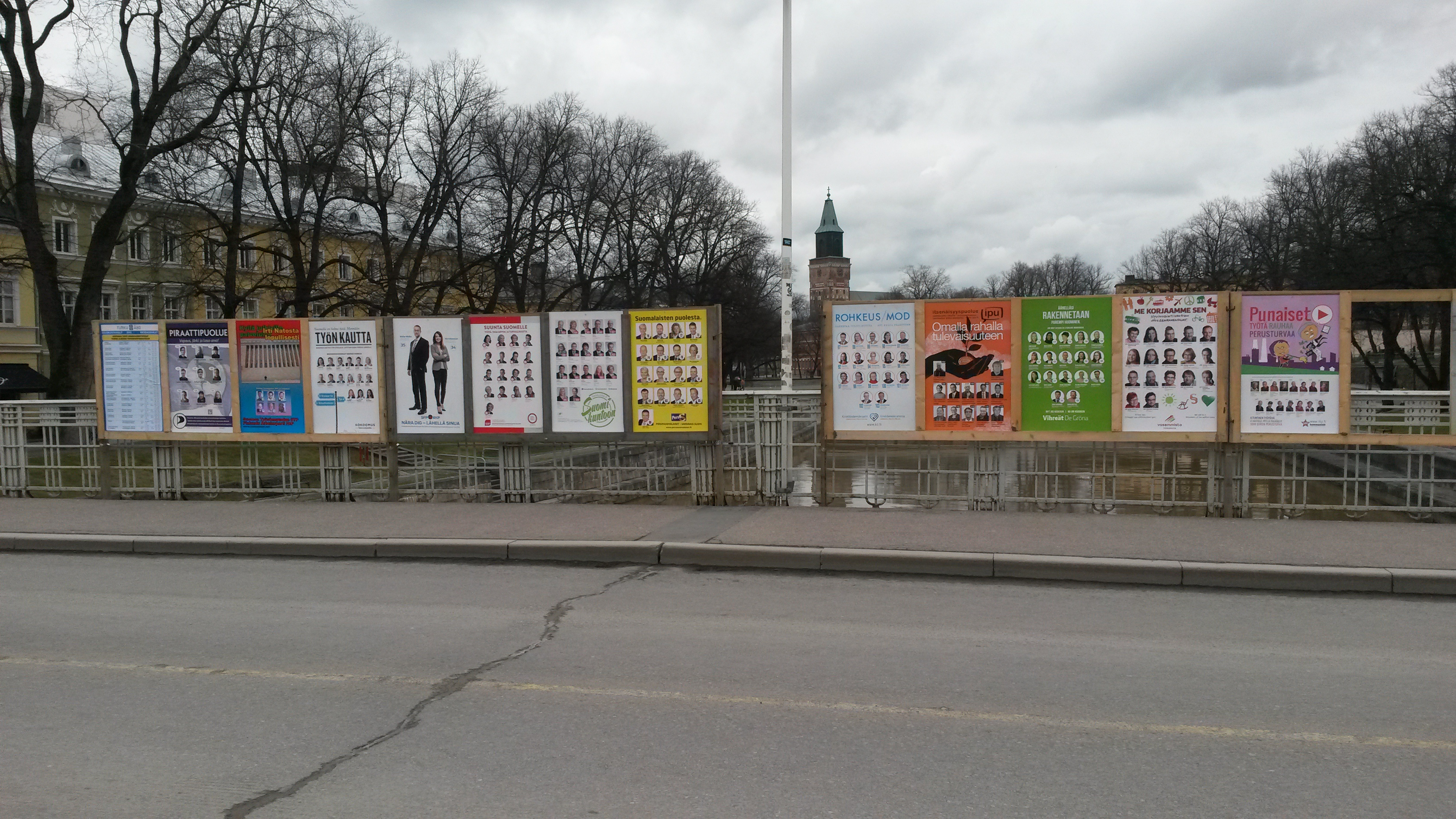 Eduskuntavaalimainontaa Turussa Aurasillalla 3.4.2015